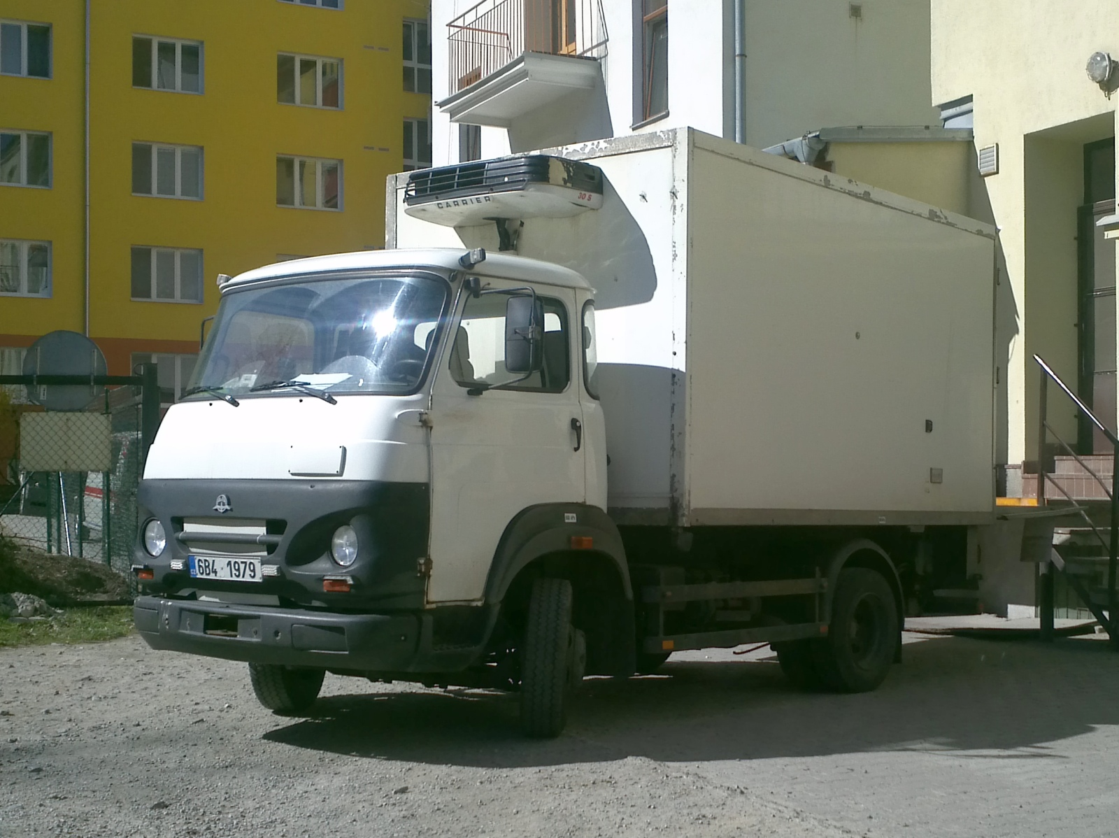 Avia A60 s chladírenskou skříní, Brno.